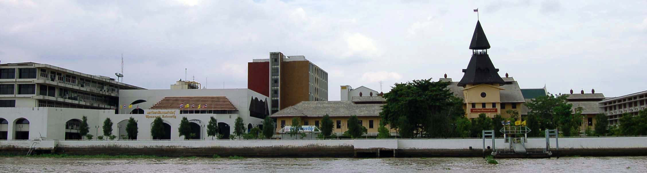 มหาวิทยาลัยธรรมศาสตร์ ถ่ายจากฝั่งศิริราช